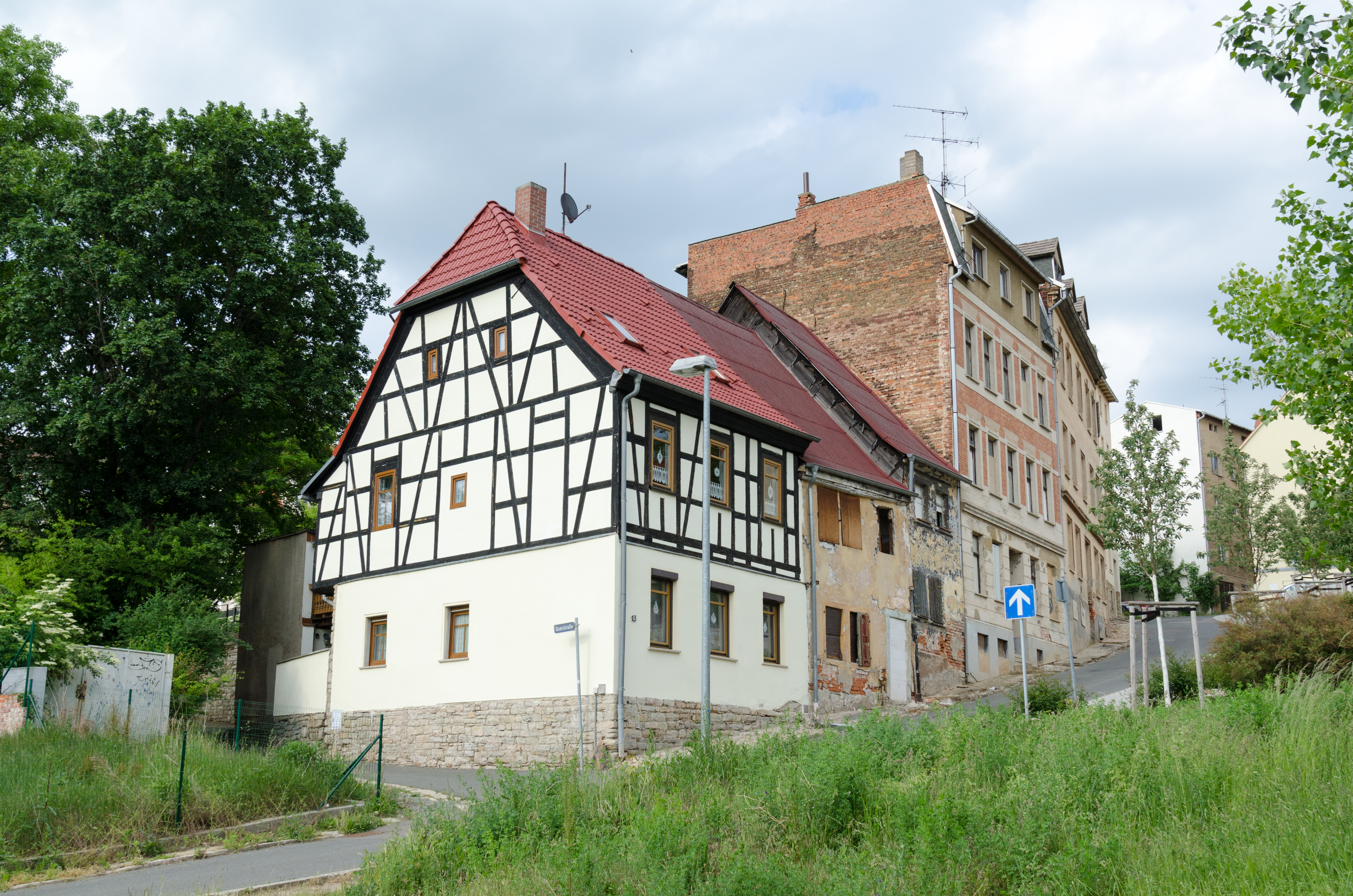 Zeitz, Scharrenstraße 13 bis 2